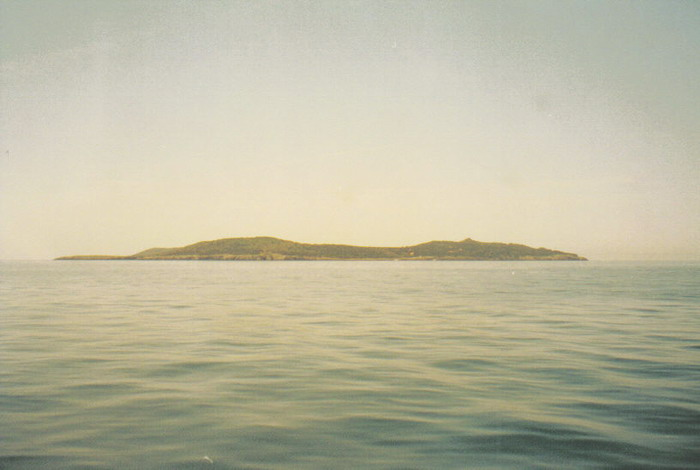 L'isola di Giannutri vista dal mare; foto scattata nell'estate 2002 con apparecchio non digitale da Vinattieri Matteo che lascia in pubblico dominio dopo parziale rielaborazione successiva